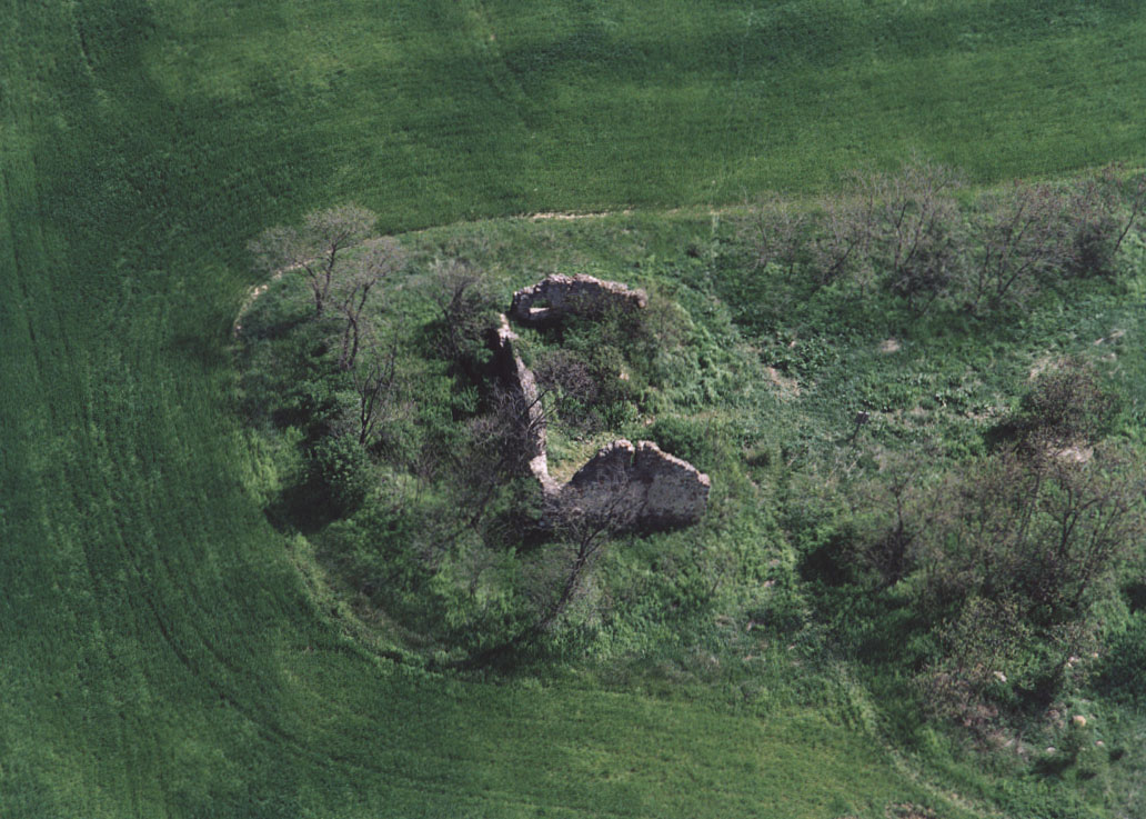 Temple - Mindszentkálla - Hungary - Europe